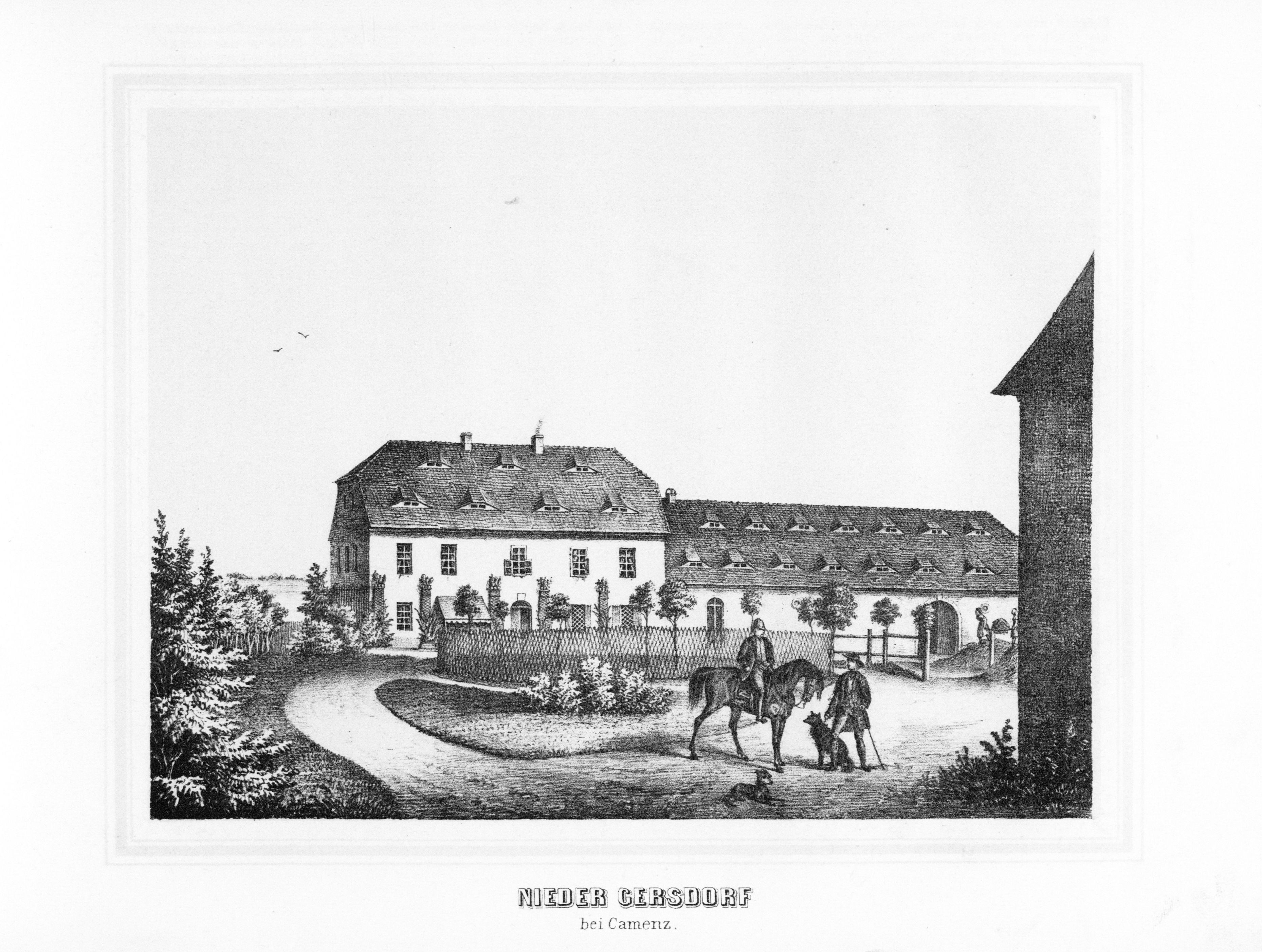 Nieder Gersdorf aus: Album der Rittergüter und Schlösser im Königreiche Sachsen Markgrafenthum Oberlausitz Section: III